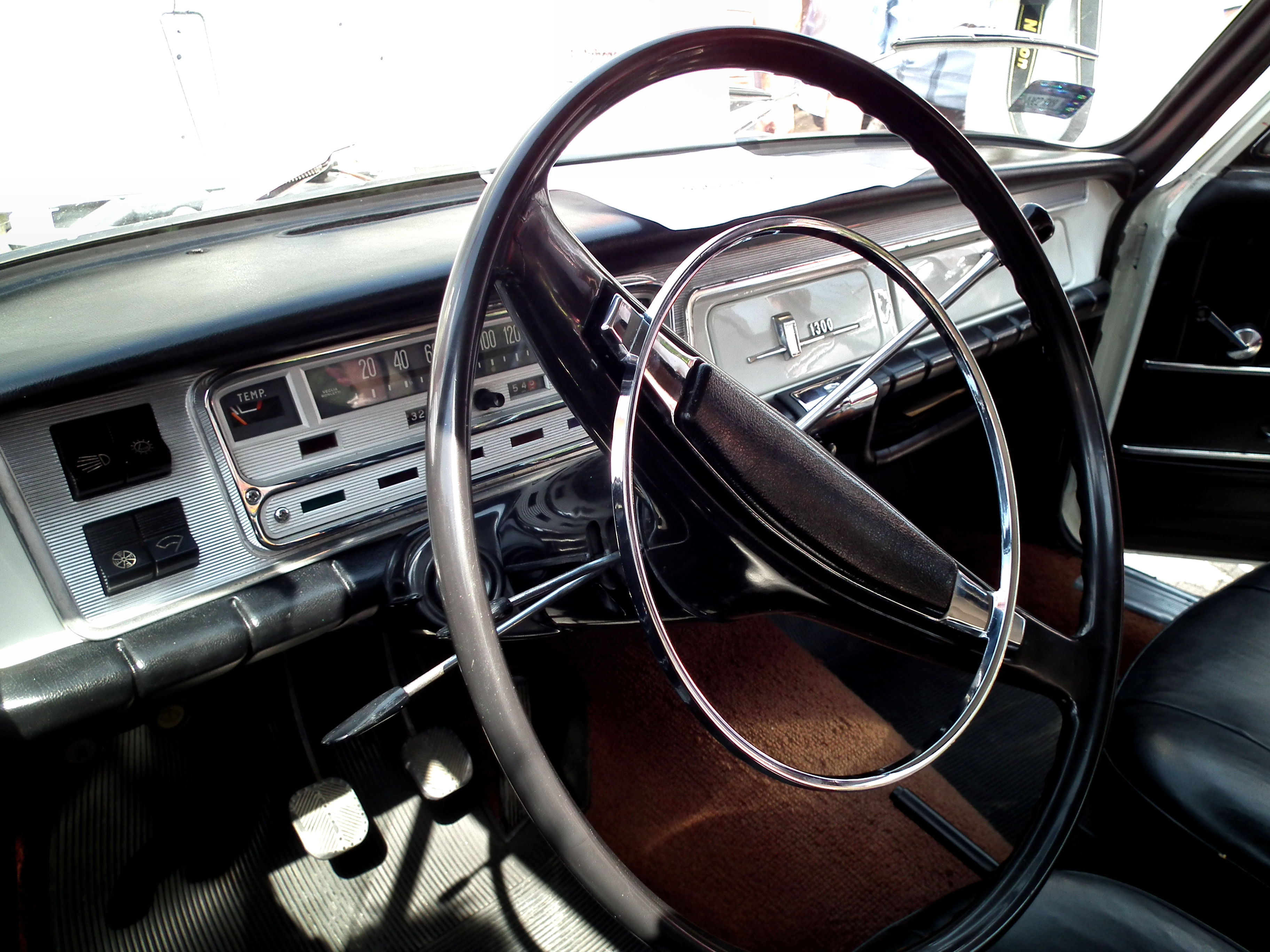 Polski Fiat 125p 1300 wyprodukowany 1 stycznia 1969. II Zlot pojazdów zabytkowych w Jaśle.